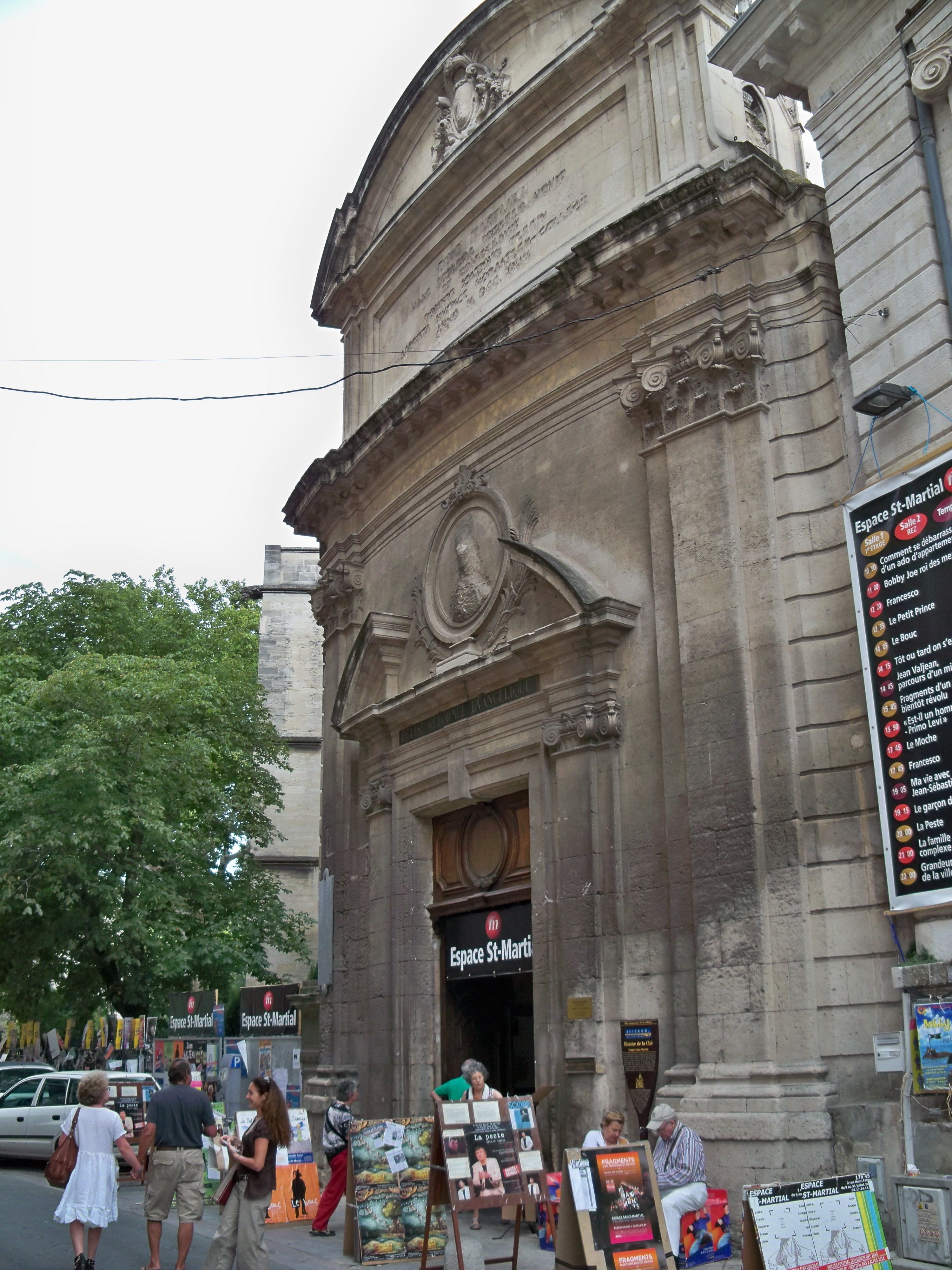 Temple Saint Martial durant le festival d'Avignon 2011